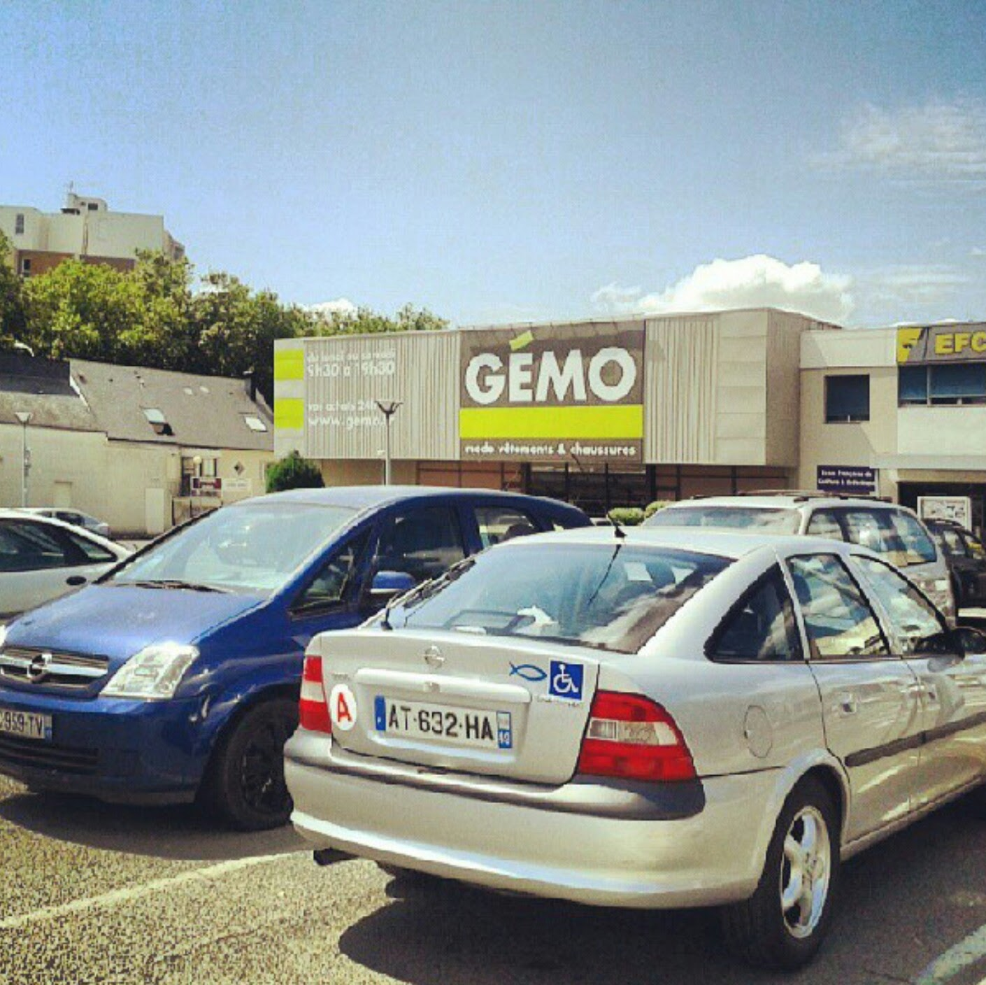 GEMO à Angers , France (2013)